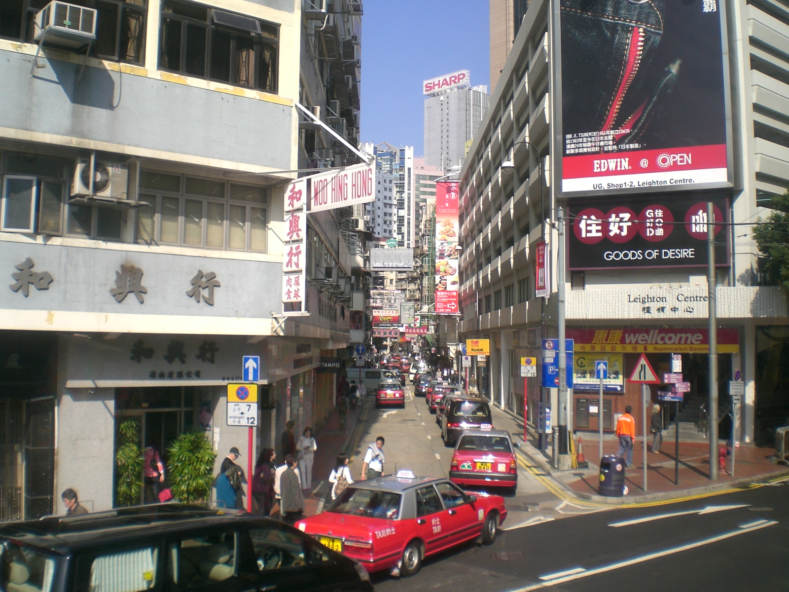 香港島銅鑼灣禮頓道